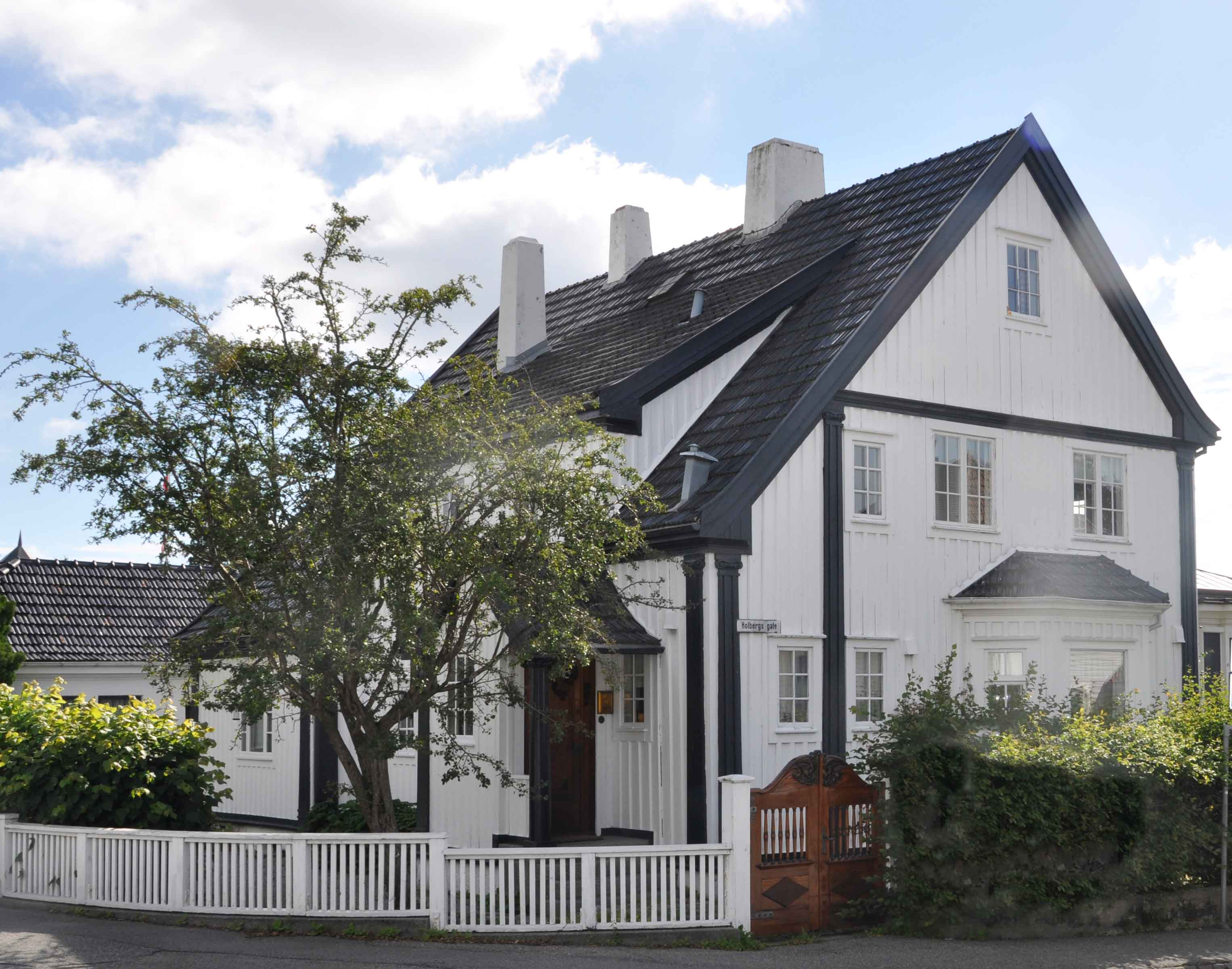 Fasade mot gaten, Eiganesveien 82, Michael Slettebø